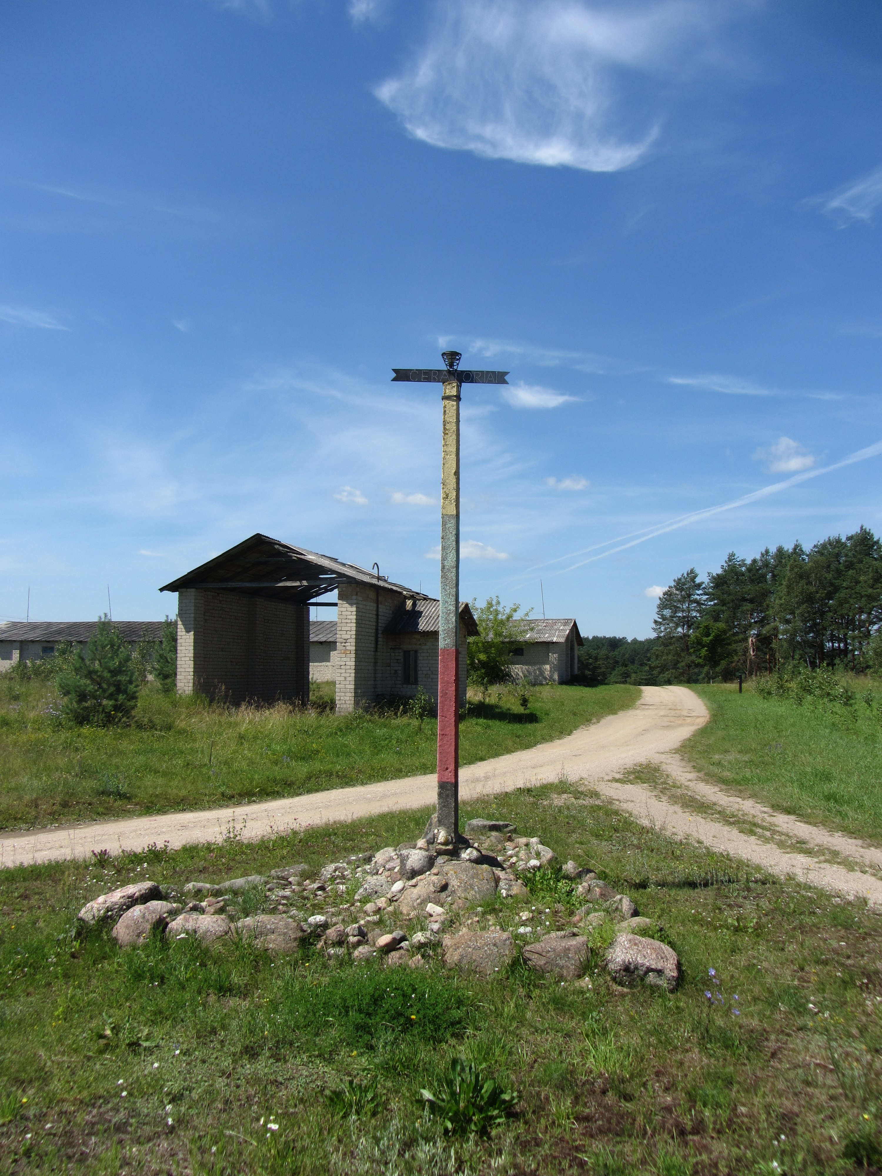 Čebatoriai 65440, Lithuania